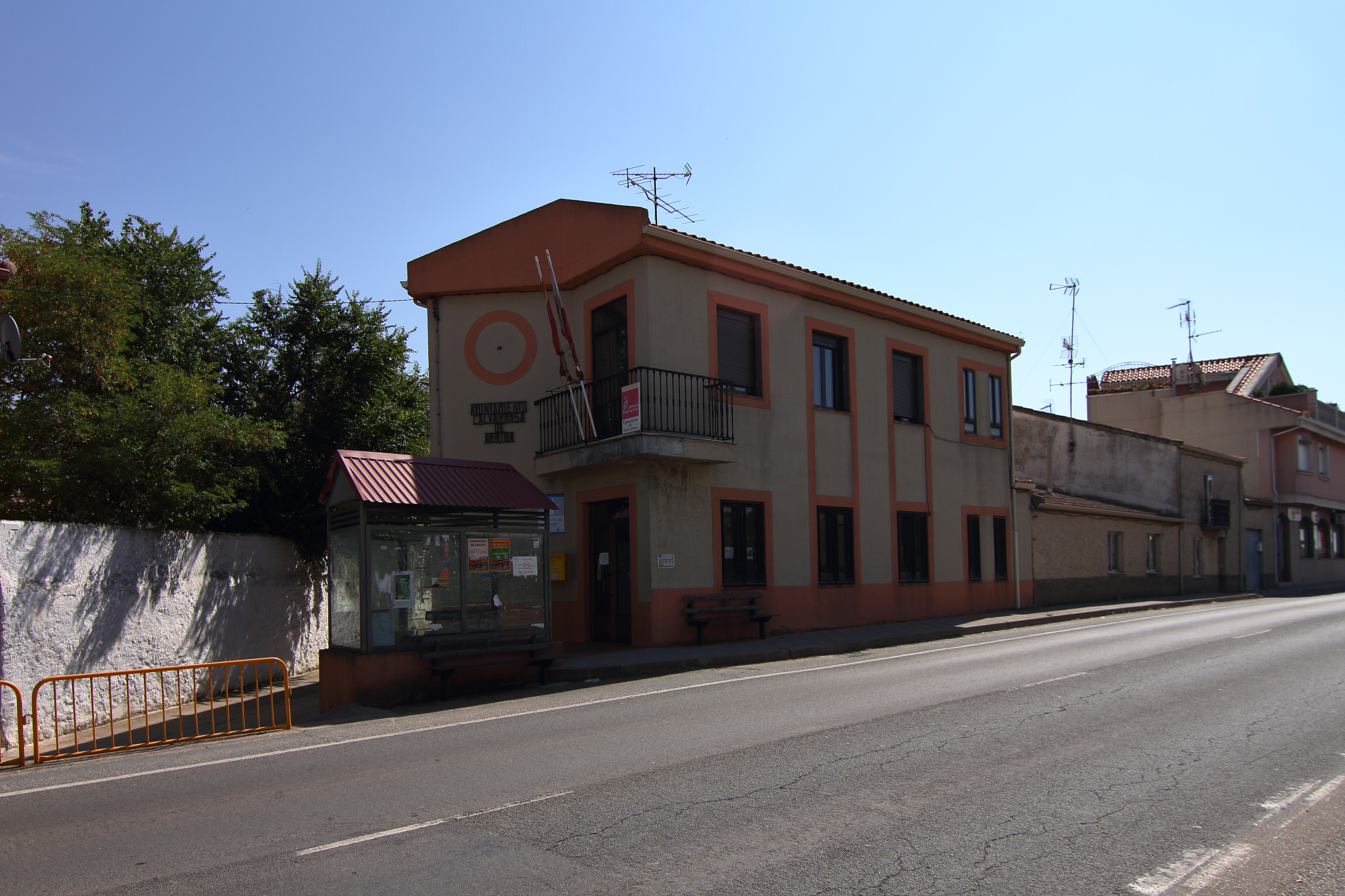 Ayuntamiento de Calvarrasa de Arriba